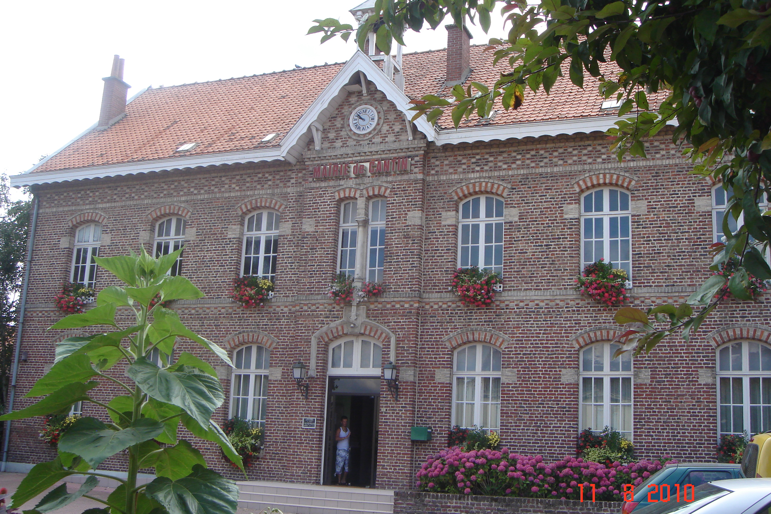 Mairie de Cantin - Département du Nord - France